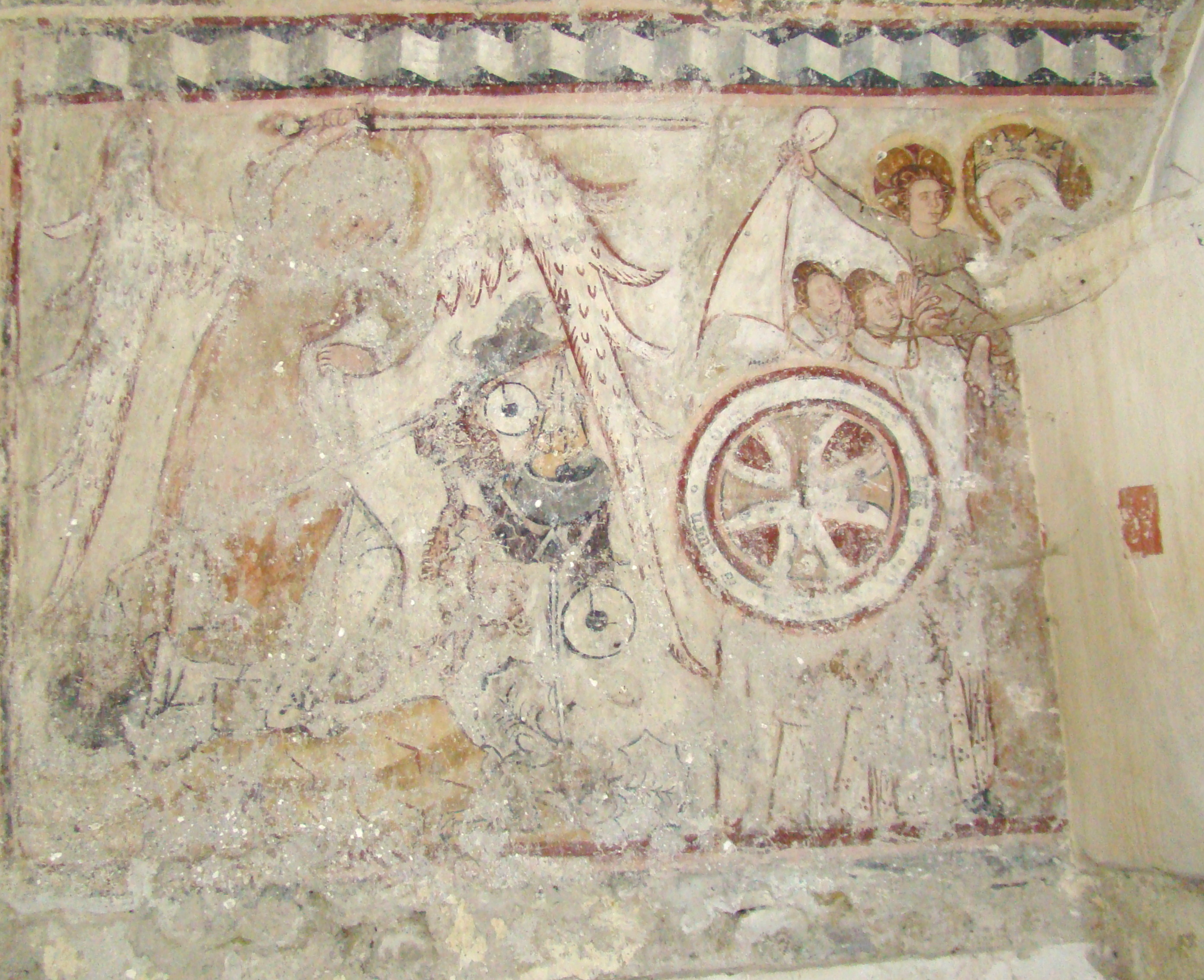 Biserica evanghelică, sat Șmig; comuna Alma